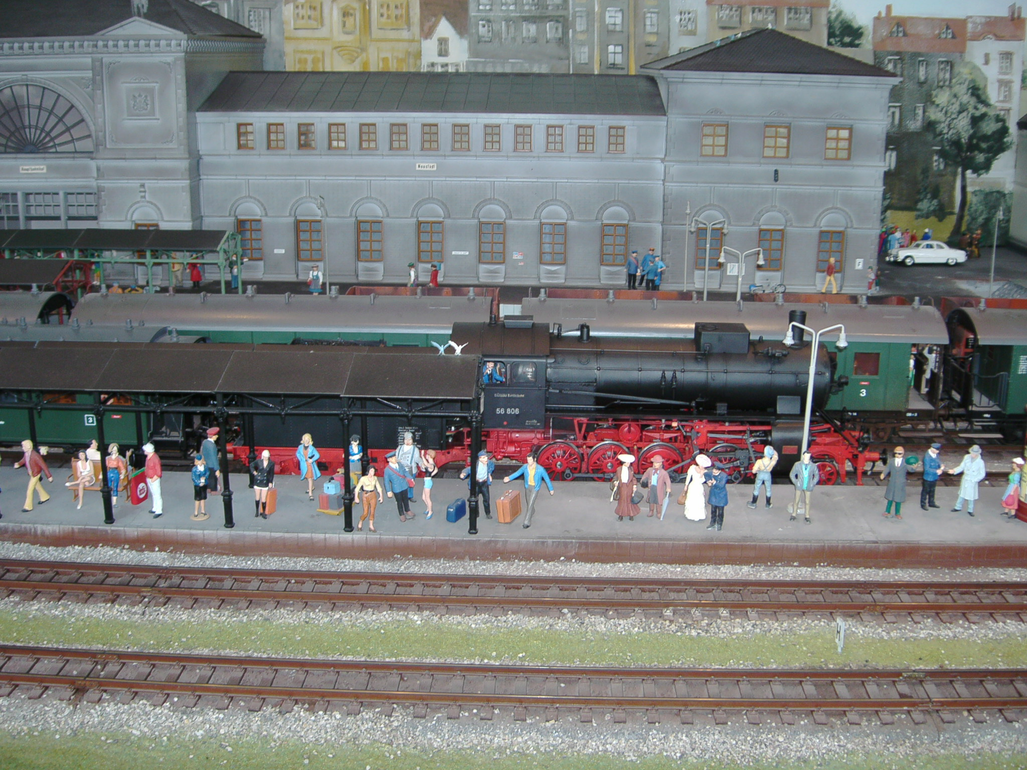 Die weltweit größte serienmäßig hergestellte Eisenbahnanlage der Spur II können Sie in unserem extra für diesen Zweck gebauten Seitentrakt des Museums EFA Mobile Zeiten genießen. Auf einer Fläche von über 500 m2 sind rund 650 Meter Gleise, mit über 50 Weichen und rund 80 verschiedenen Signalen verbaut. Kreuzungen, Regel- und Schmalspuranlagen entsprechen mit ihren Abmessungen exakt maßstäblich dem Original. 14 Meter Gleise wurden allein im Bahnhofsbereich verlegt, dessen Blickfang die Lok-Drehscheibe mit 1,10 Meter Durchmesser und 15 Lokständen ist.